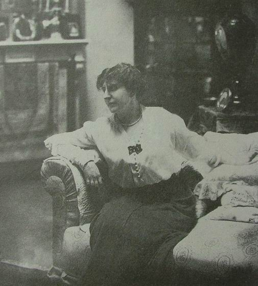 Е.В.Сухомлинова, жена министра Сухомлинова